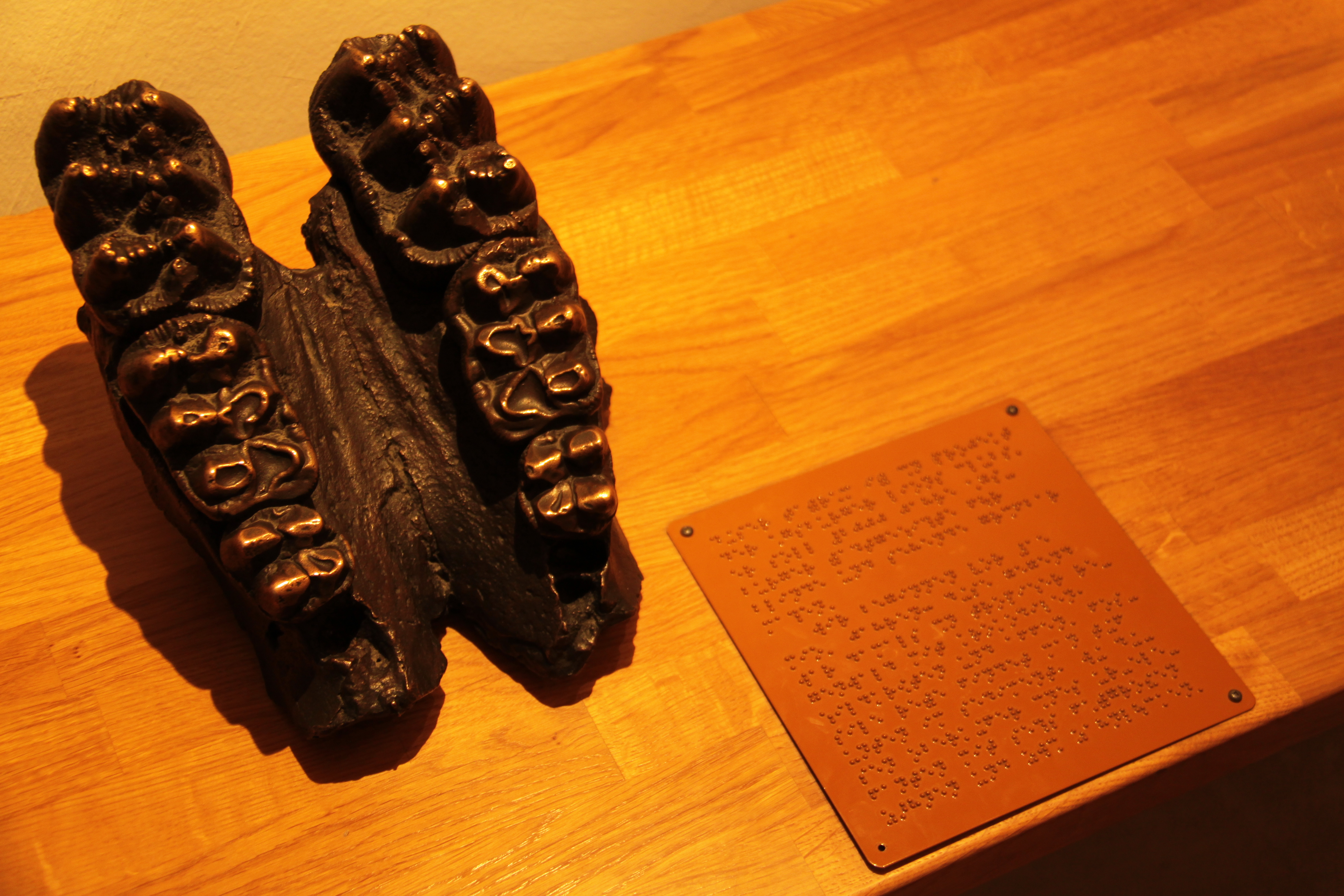 Impressionen Augsburg